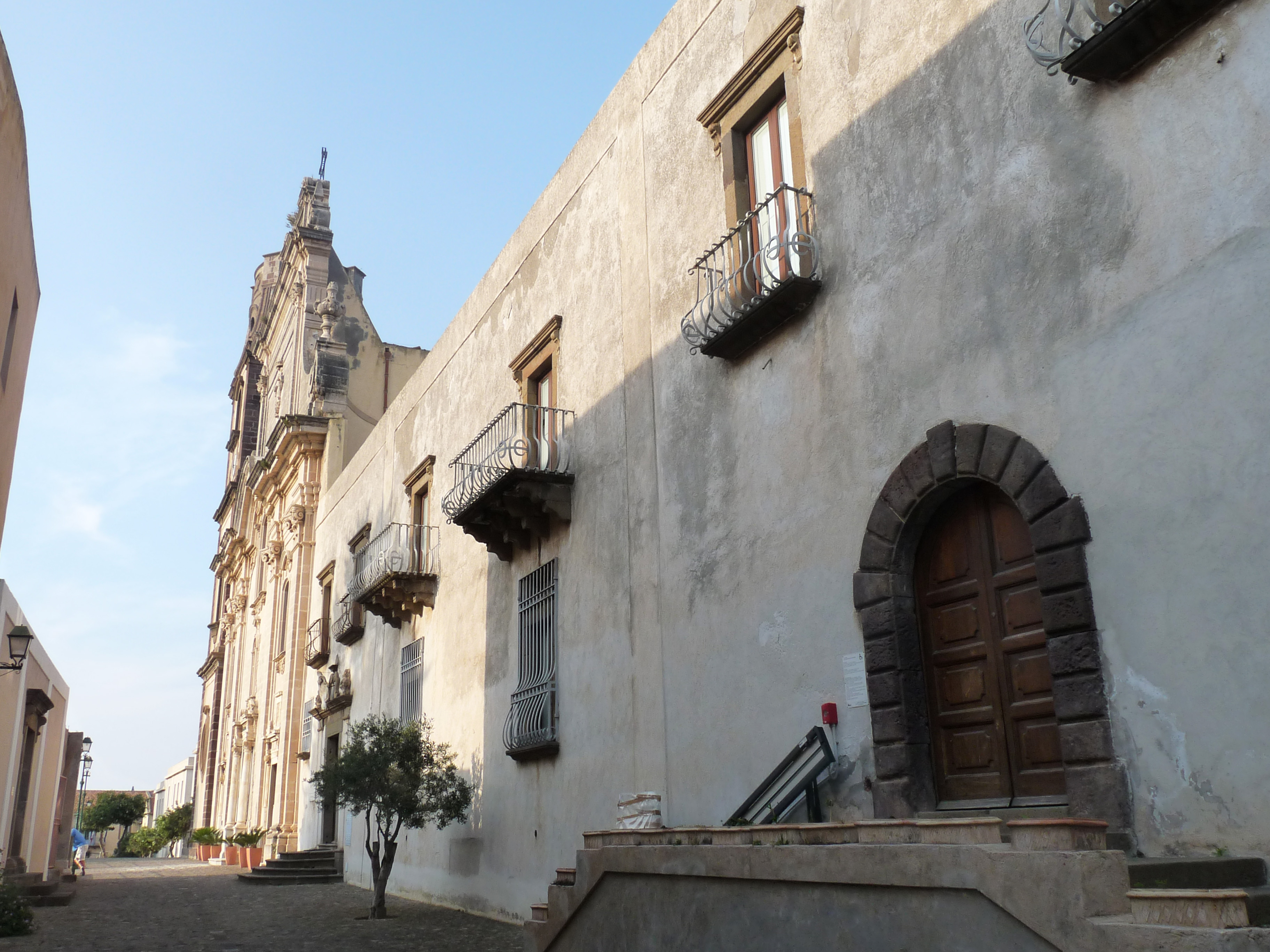 Musée archéologique éolien de Lipari (Sicile). Section Préhistorique. Au bout de la rue, la cathédrale.